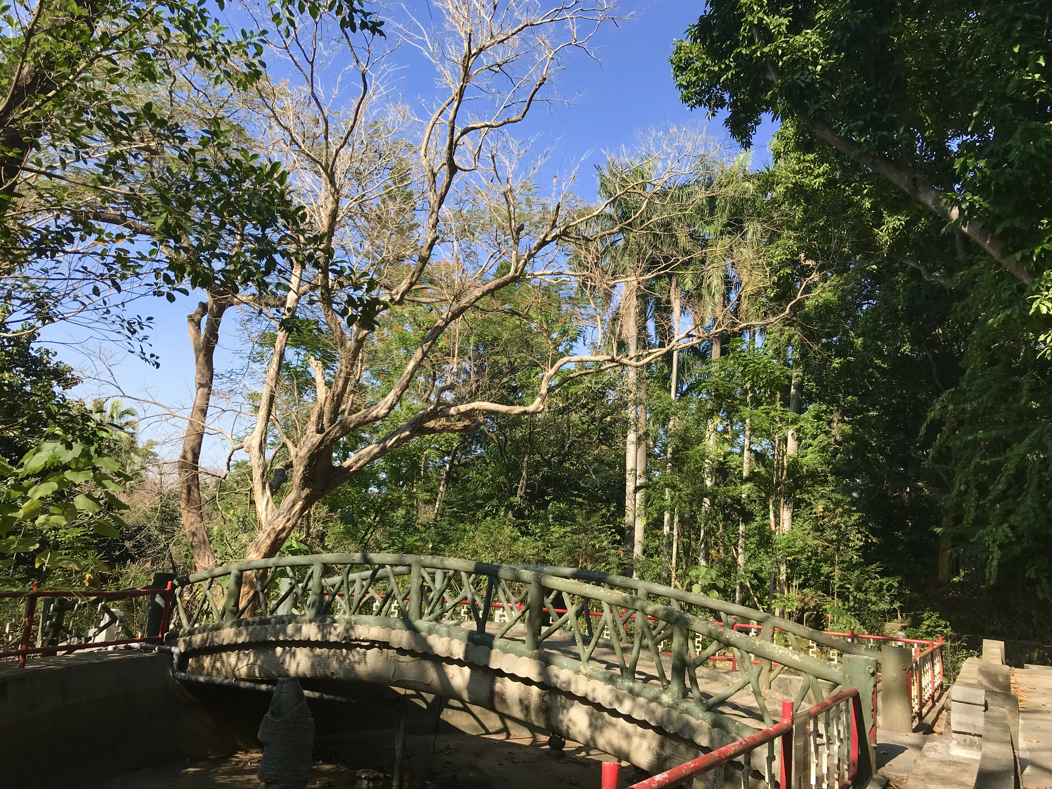 中文（台灣）: 嘉義孔子廟泮池與碧水橋